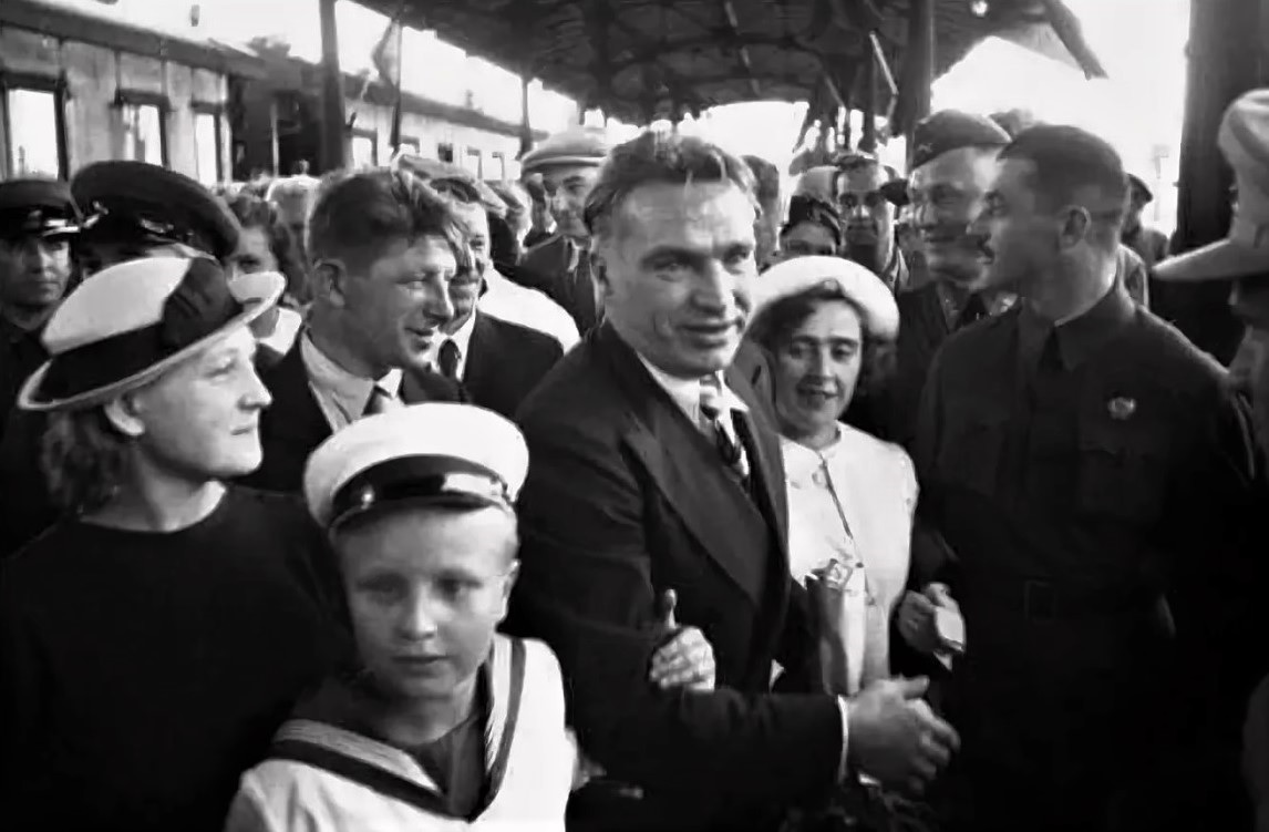 Встреча на Белорусском вокзале. В.П. Чкалов с женой Ольгой Эразмовной и сыном Игорем